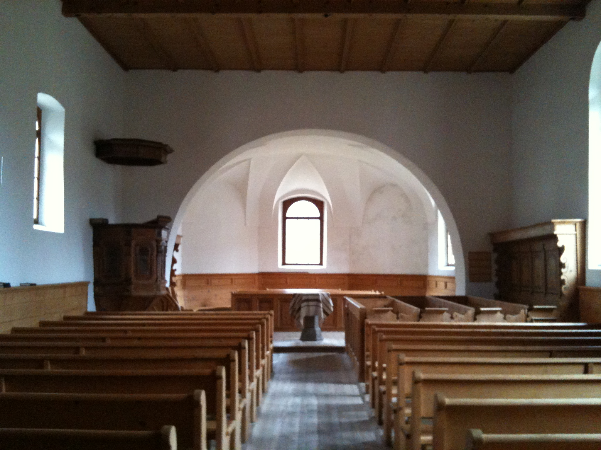 reformierte Kirche Donat GR, Kanton Graubünden